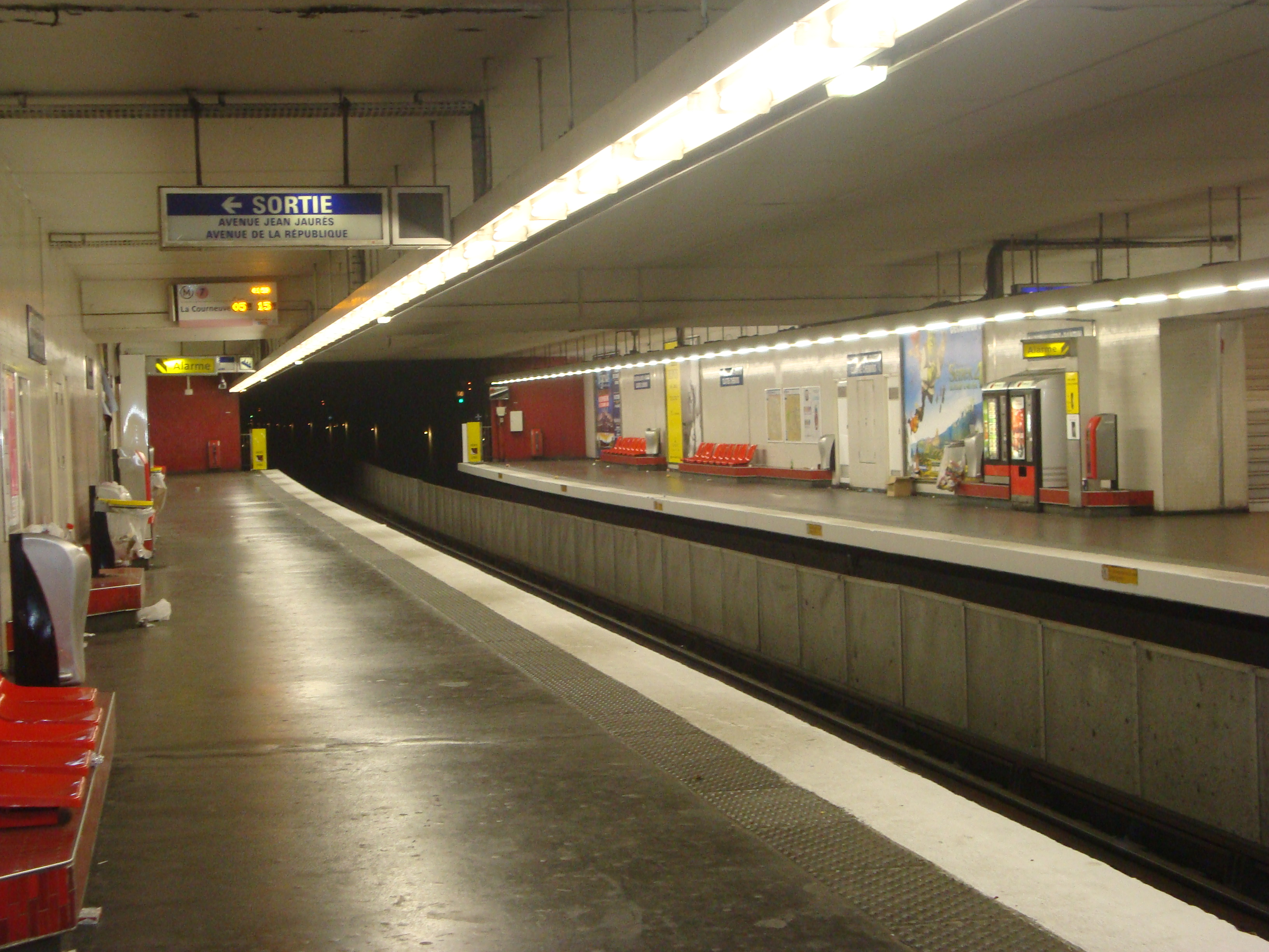 Quais de la station Quatre Chemins sur la ligne 7 du métro de Paris.